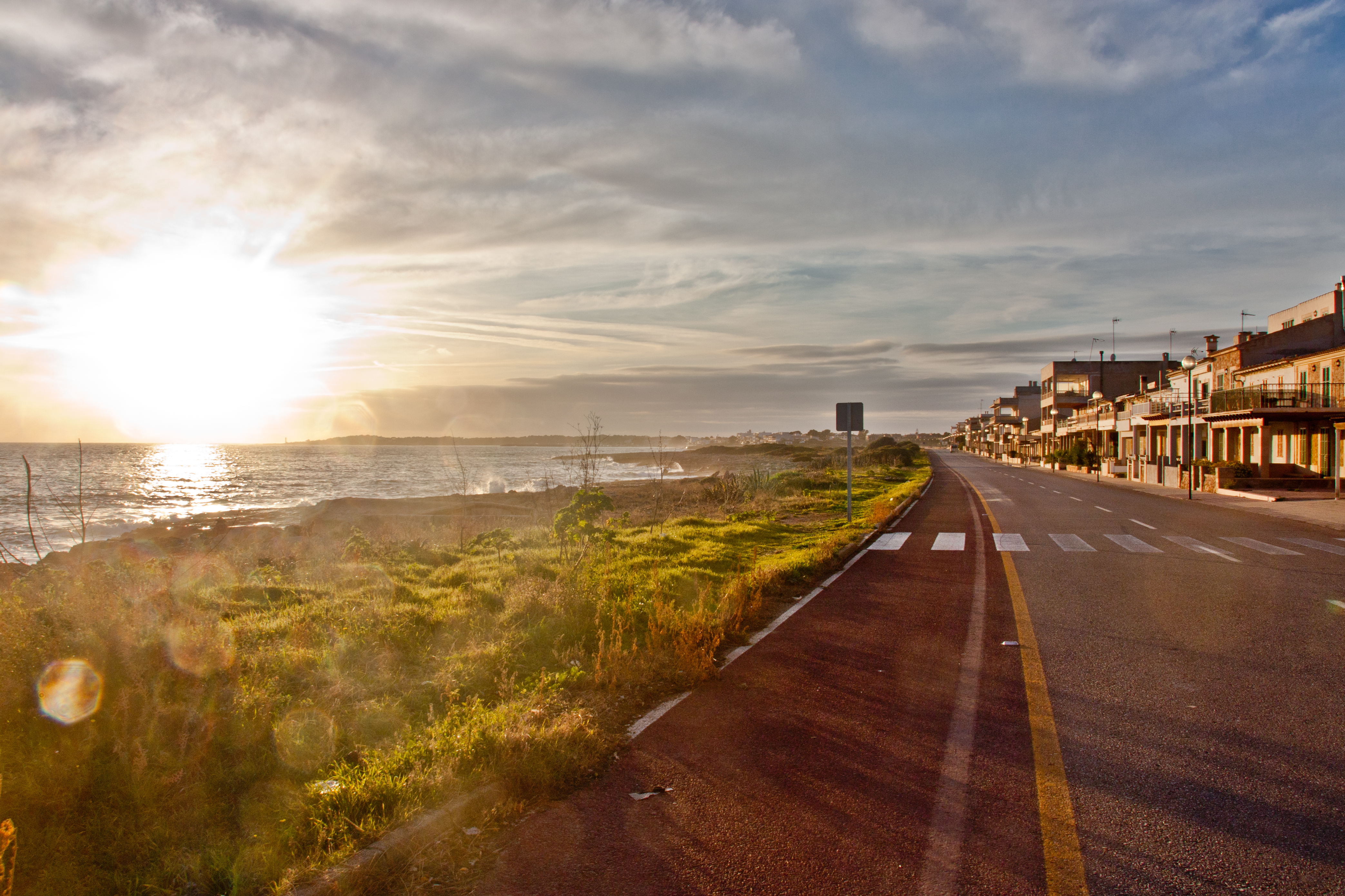 Uno de los pueblos más bonitos y más tranquilos de Mallorca